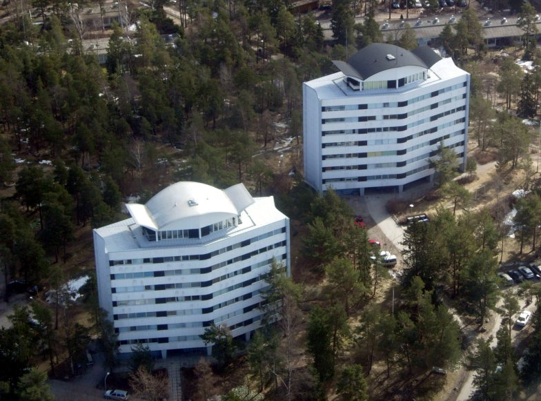 Viljo Revellin Taskumattitaloja Espoon Tapiolassa.